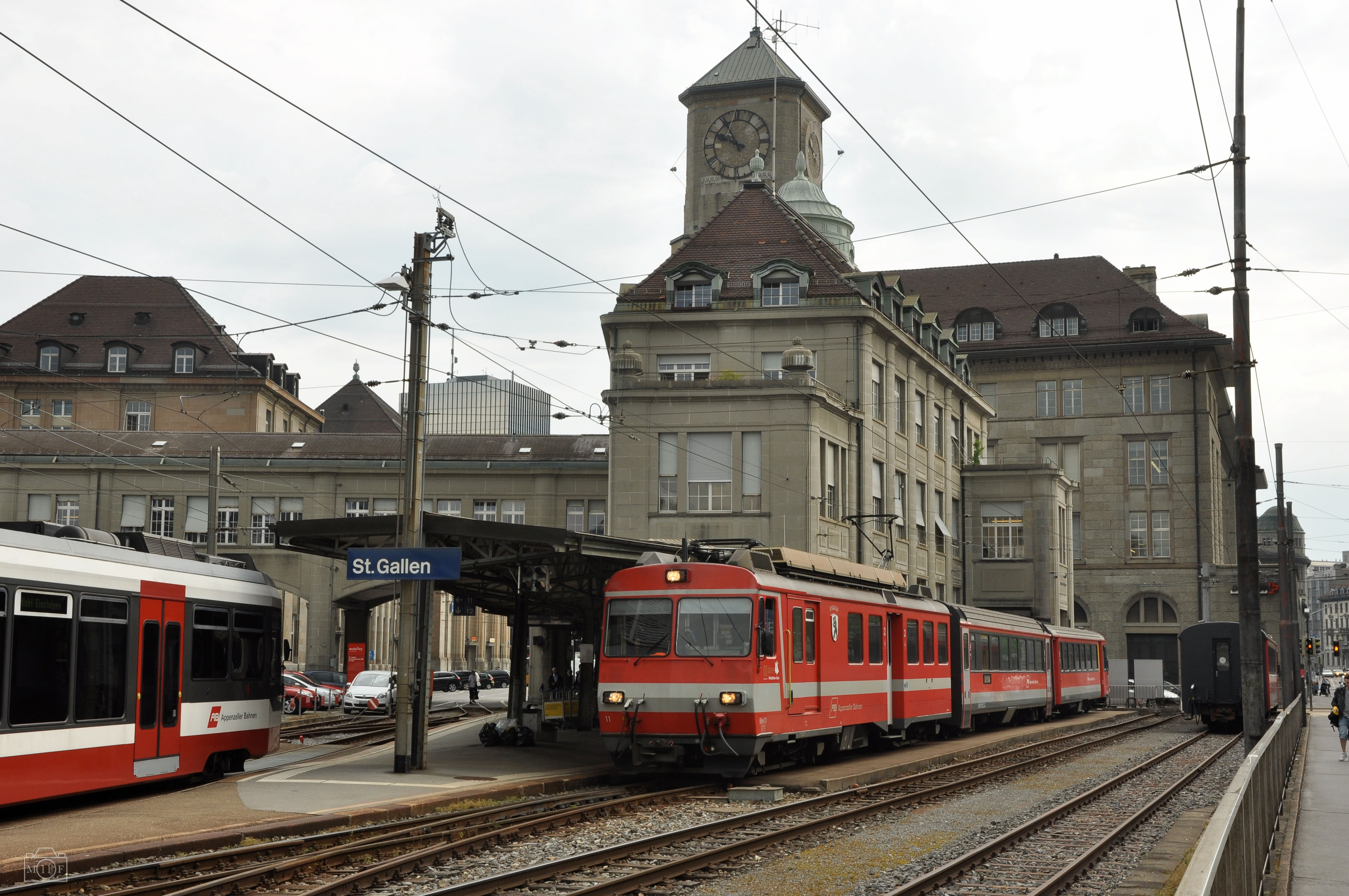 Bahnhof St. Gallen , Appenzeller Bahn